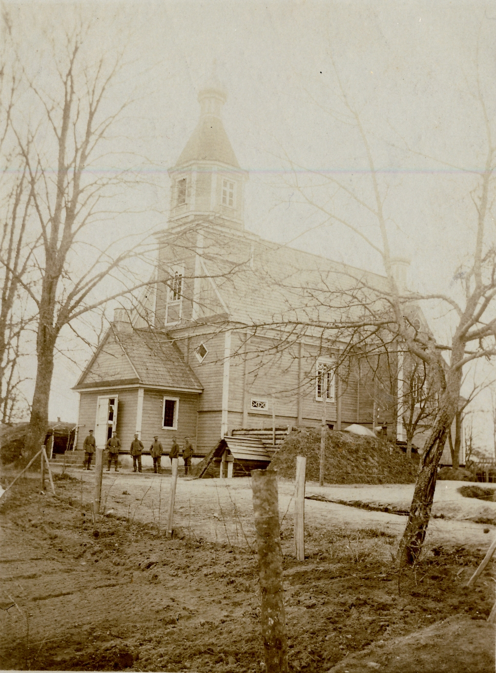 Беларуская (тарашкевіца): Лаўрышава (Łaŭryšava). Царква Прачыстай Багародзіцы